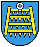 goldene Egge mit Silberring, auf blauem Grund